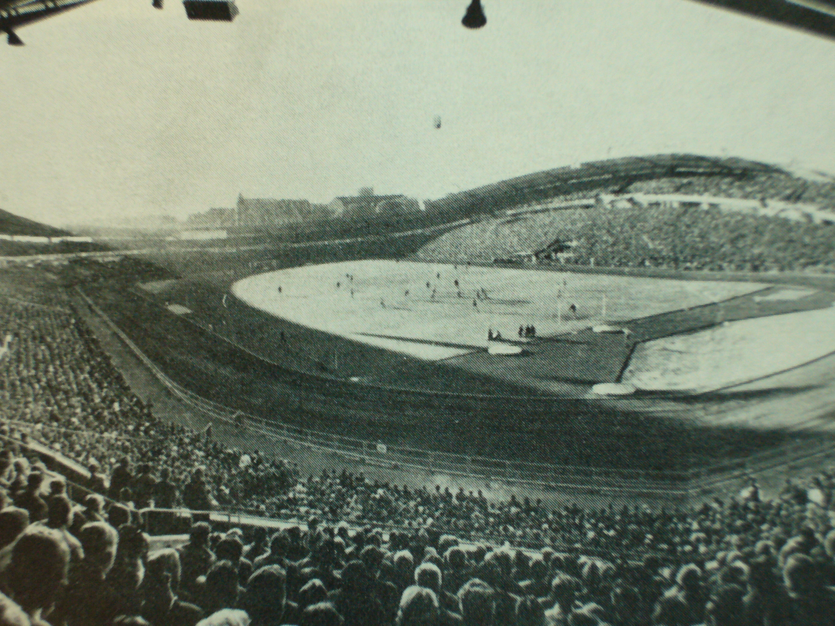 IFK Göteborg–Örgryte IS på Nya Ullevi 3 juni 1959, inför 52 194 åskådare.